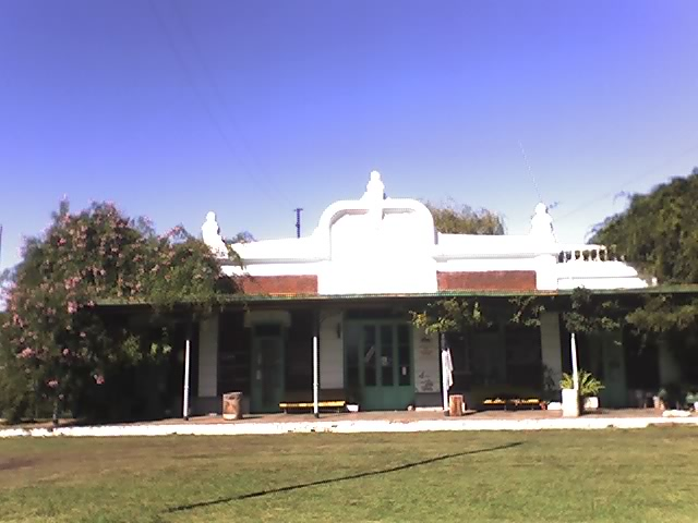 Veinte de Junio Railway Station, La Matanza Partido, Buenos Aires Province.